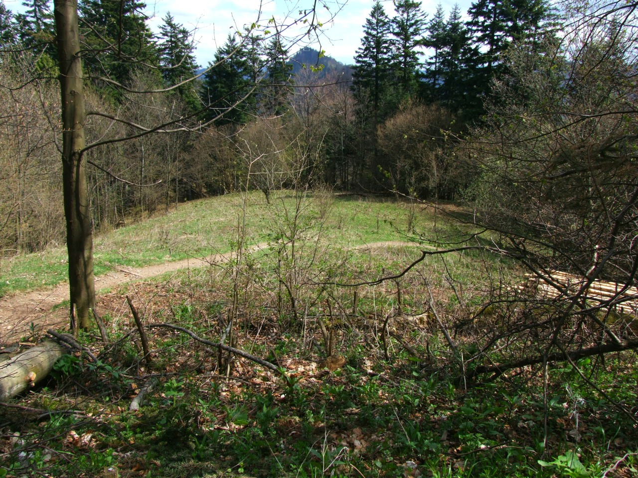 Polana Ligarki